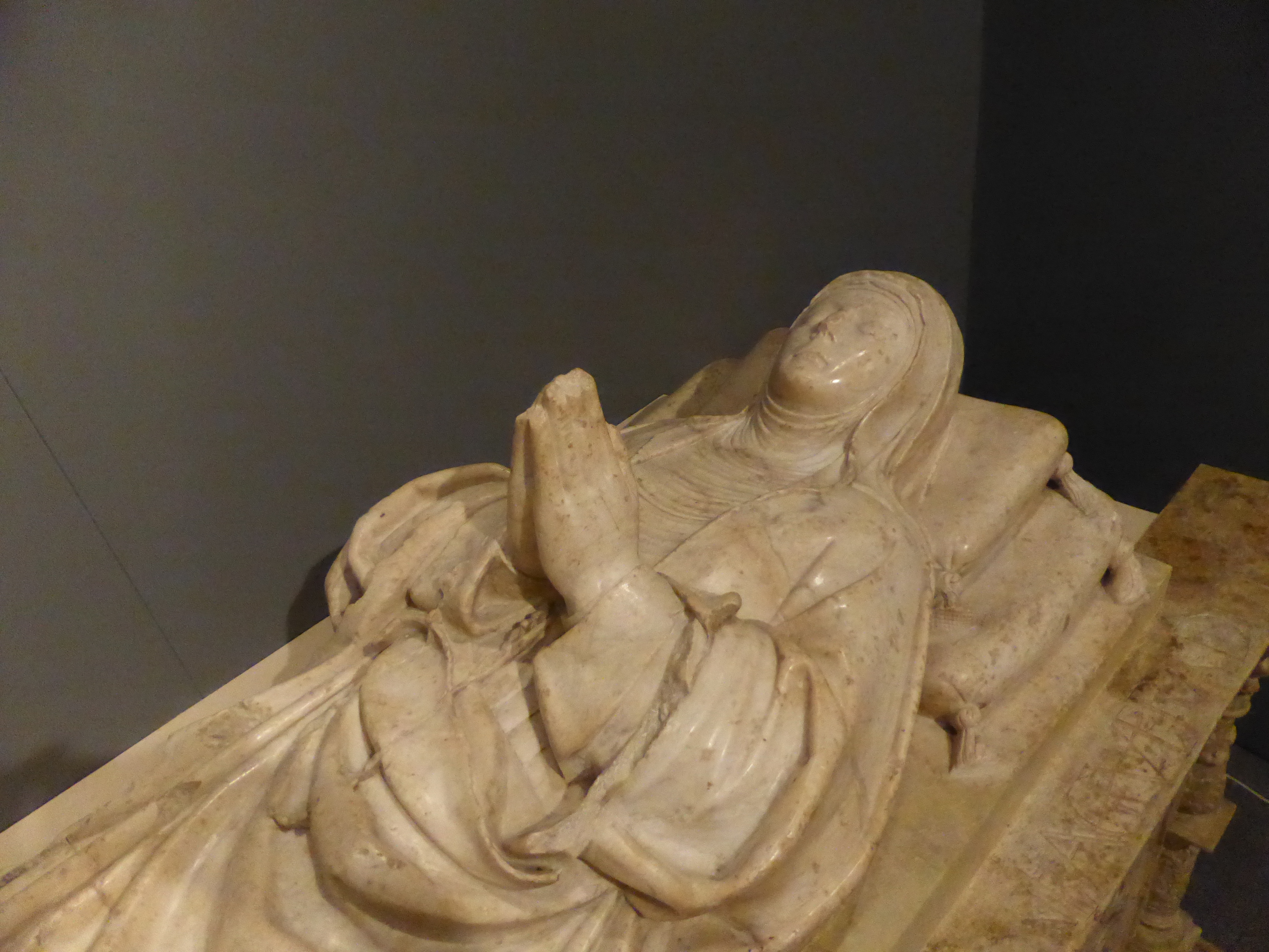 Escultura yacente, de alabastro, de Beatriz Galindo, actualmente en el Museo de los Orígenes, de Madrid. Esta escultura forma parte del cenotafio que la propia Beatriz Galindo, en 1531, encargó para el convento de la Concepción Francisca (de la calle de Toledo, de Madrid). Como es un cenotafio (tumba vacía) no fue enterrada aquí, sino en el coro del convento de la Concepción Jerónima, también fundado por ella.